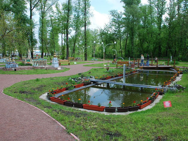 Парк «Киев в миниатюре»